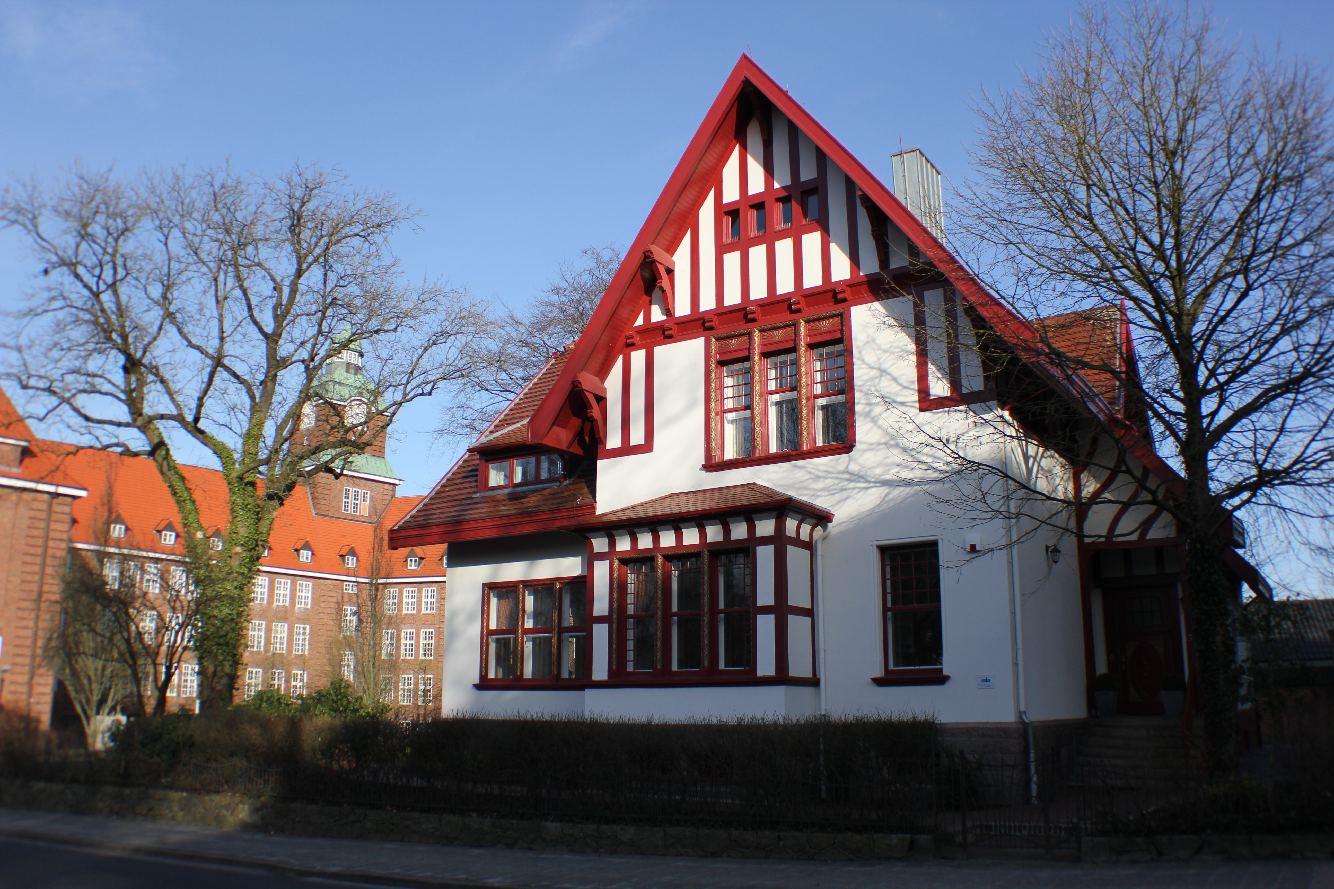 Das Jens-Jessen-Haus, Bild 004; mit Alten Gymnasium im Hintergrund